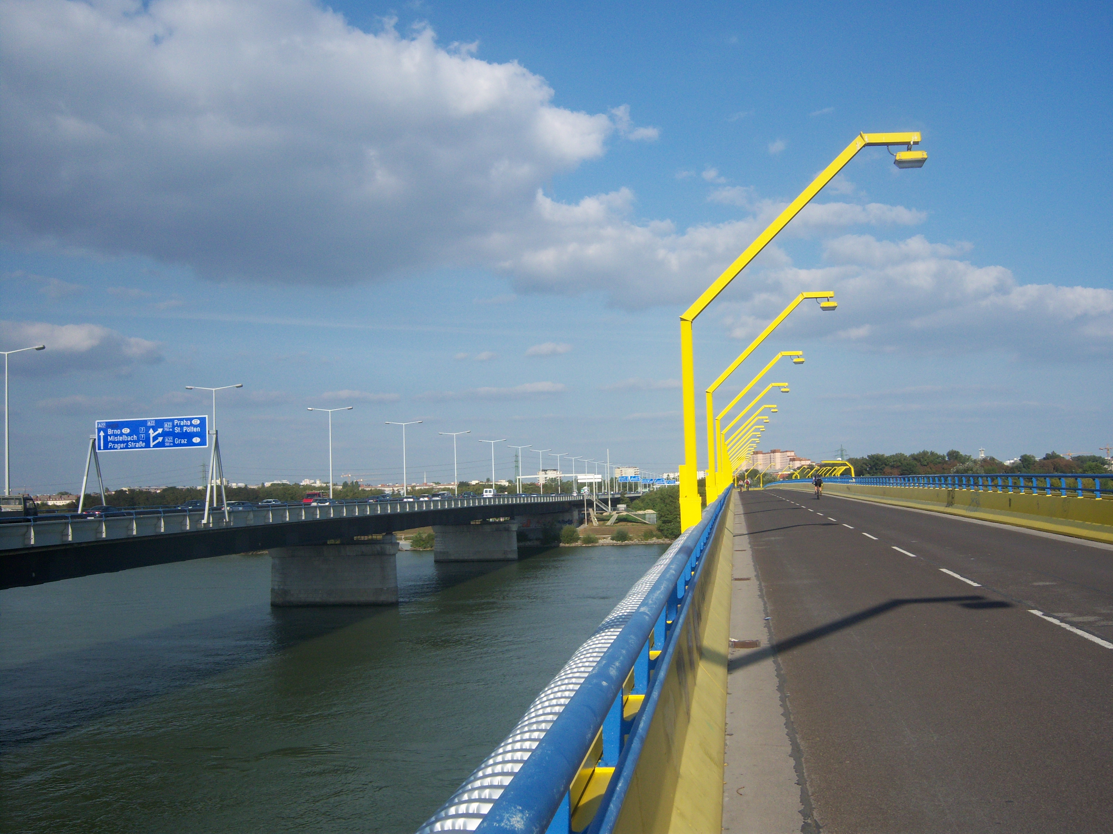 Links: Nordbrücke, Rechts: Steinitzsteg